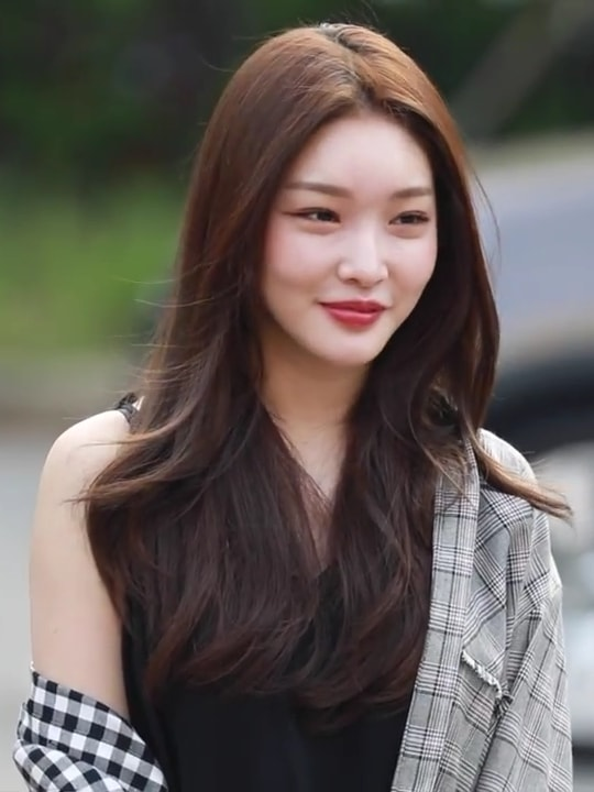 Kim Chung-ha chegando ao Music Bank da KBS, em 03 de agosto de 2018